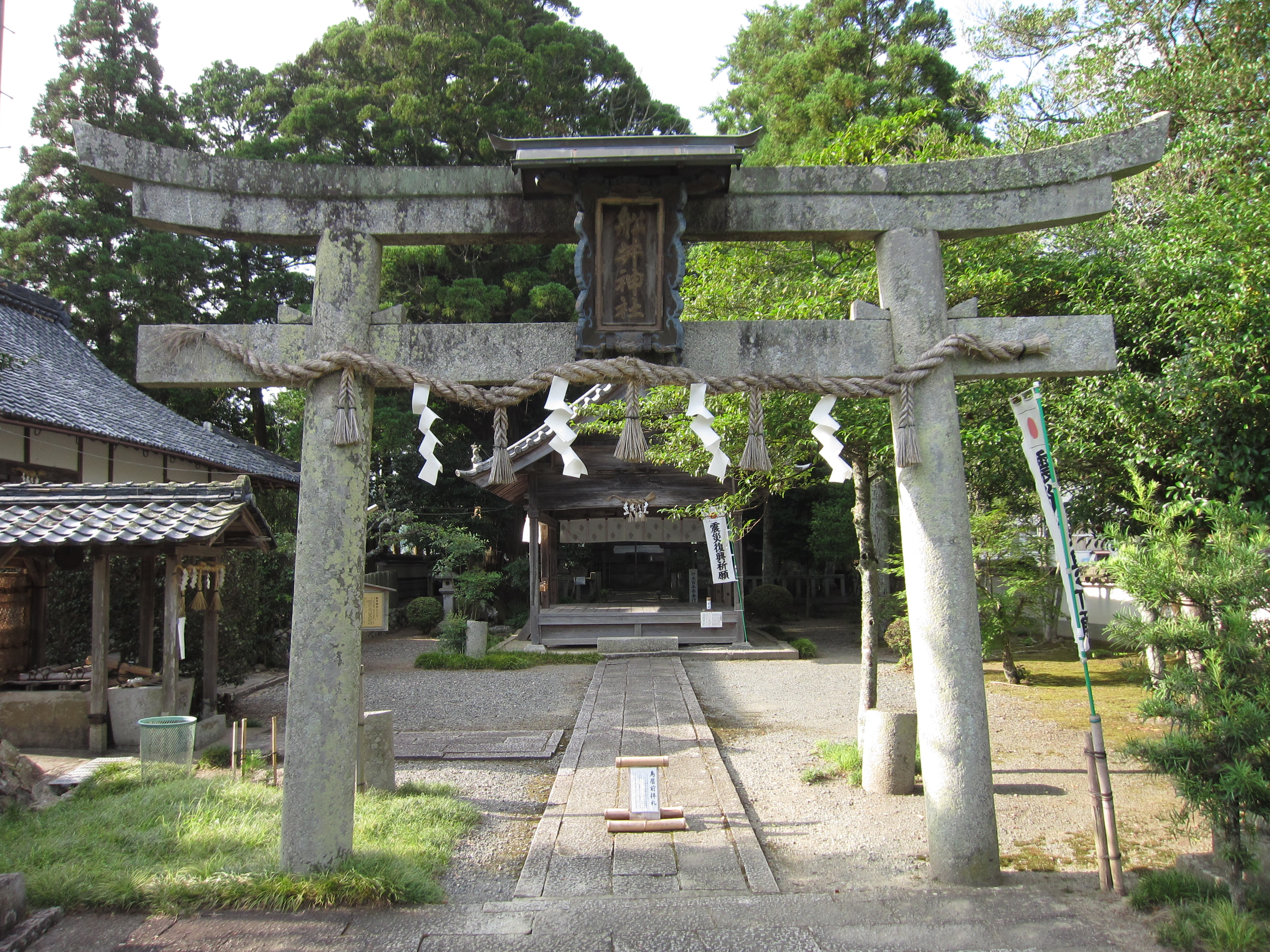 船井神社 鳥居 （ファイル名の「Kameoka（亀岡市所在）」は「Nantan（南丹市所在）」の誤りです）